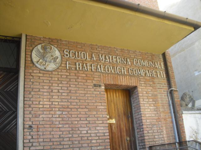 immagine della facciata della scuola